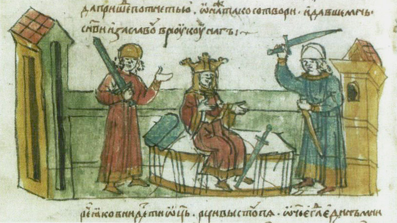 Беларуская (тарашкевіца): Мініятура Радзівілаўскага летапісу: Уладзімер хоча пакараць Рагнеду сьмерцю, але на абарону маці ўстае князевіч Ізяслаў